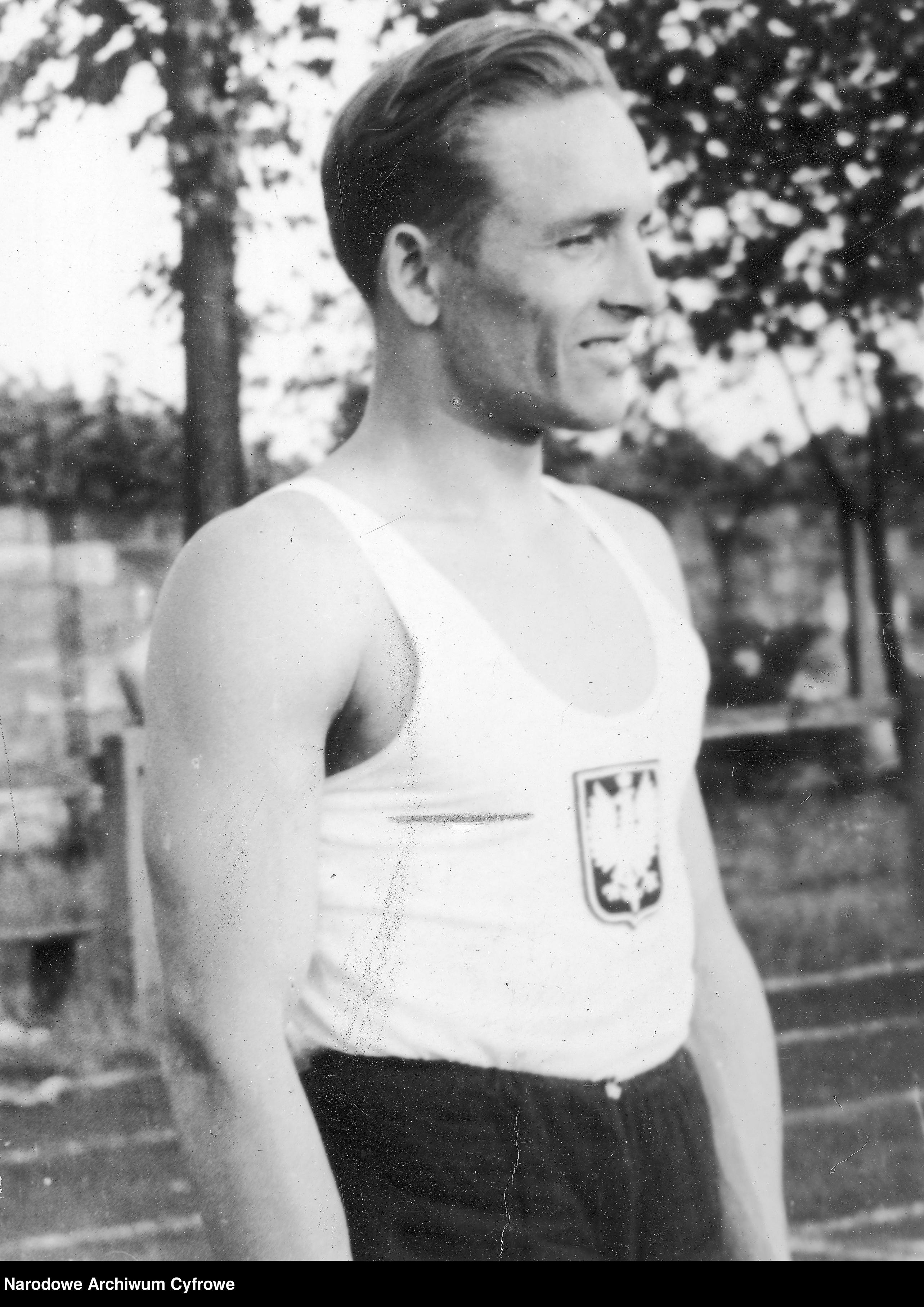 Grzegorz Dunecki, lekkoatleta w stroju sportowym w 1938